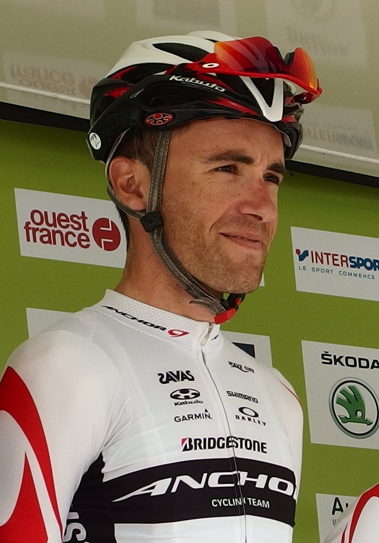 Tour de Bretagne 2015 - Présentation des équipes au départ de la troisième étape à Baud - Équipe Bridgestone Anchor Depicted person: Thomas Lebas